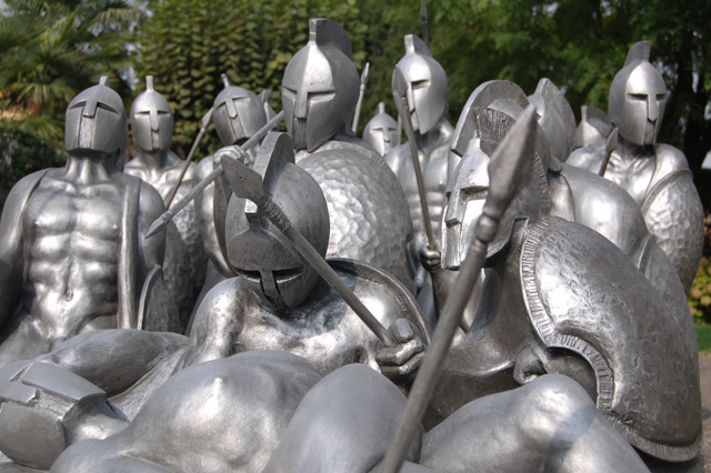 Gruppo di statue chiamate "Gli Spartani", realizzate in vetroresina.